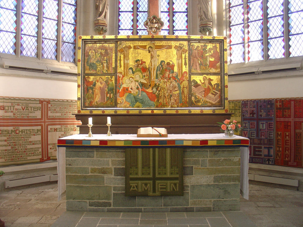 Altartafel in der Paulikirche (Conrad von Soest, 1430)